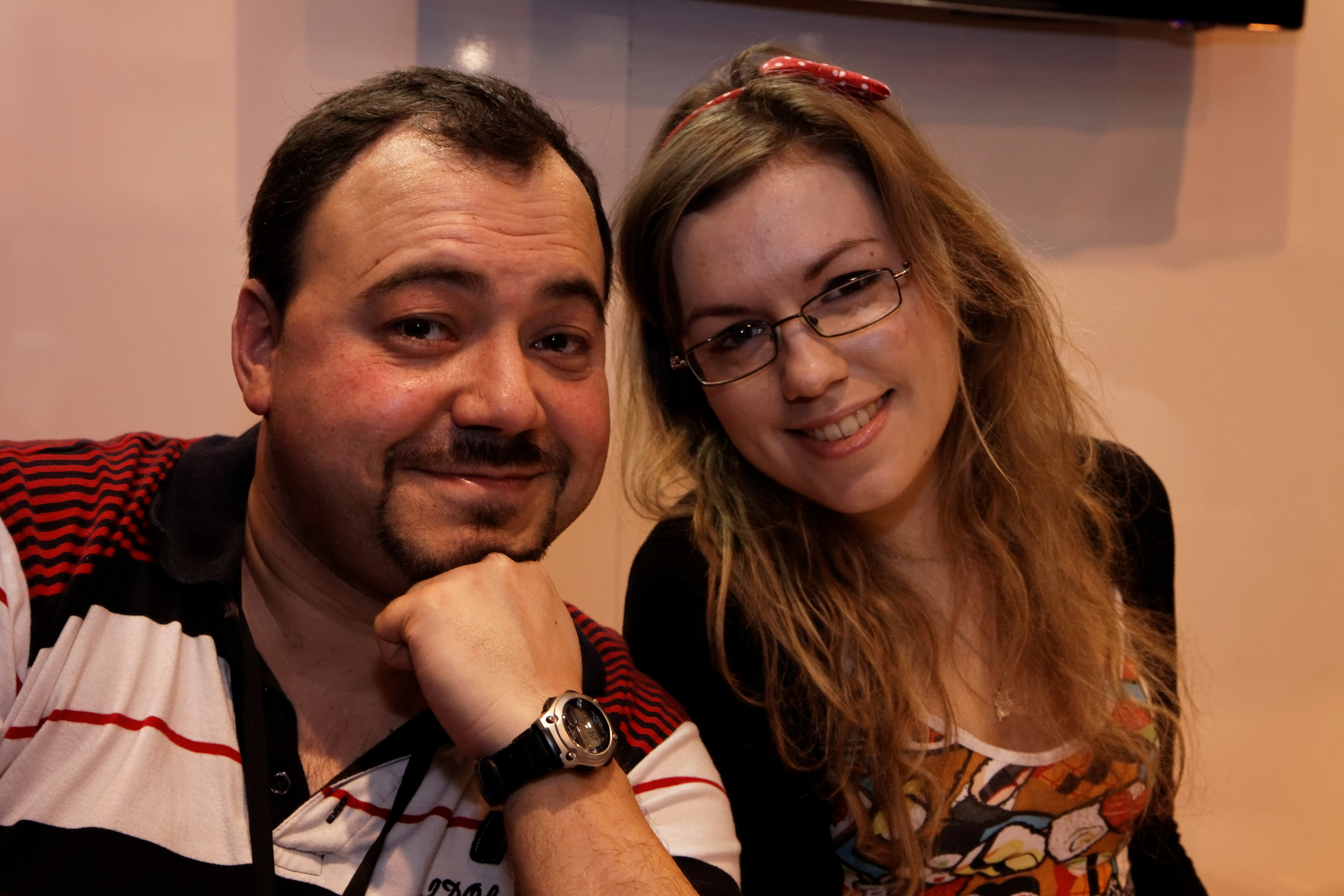 Patrick Sobral et Nadou en dédicace lors du salon du livre 2012.